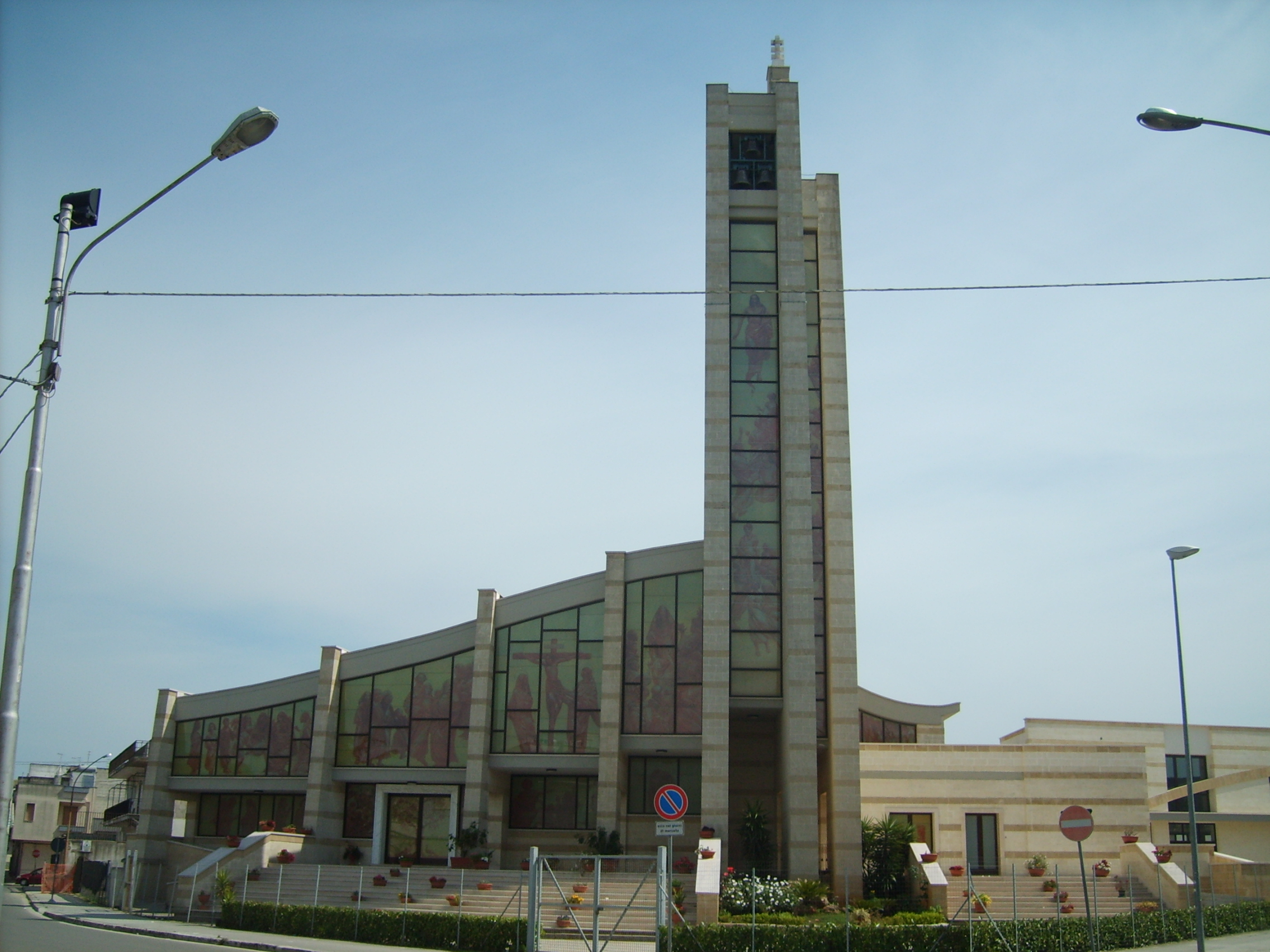 Chiesa dei Sette Dolori (nuova)